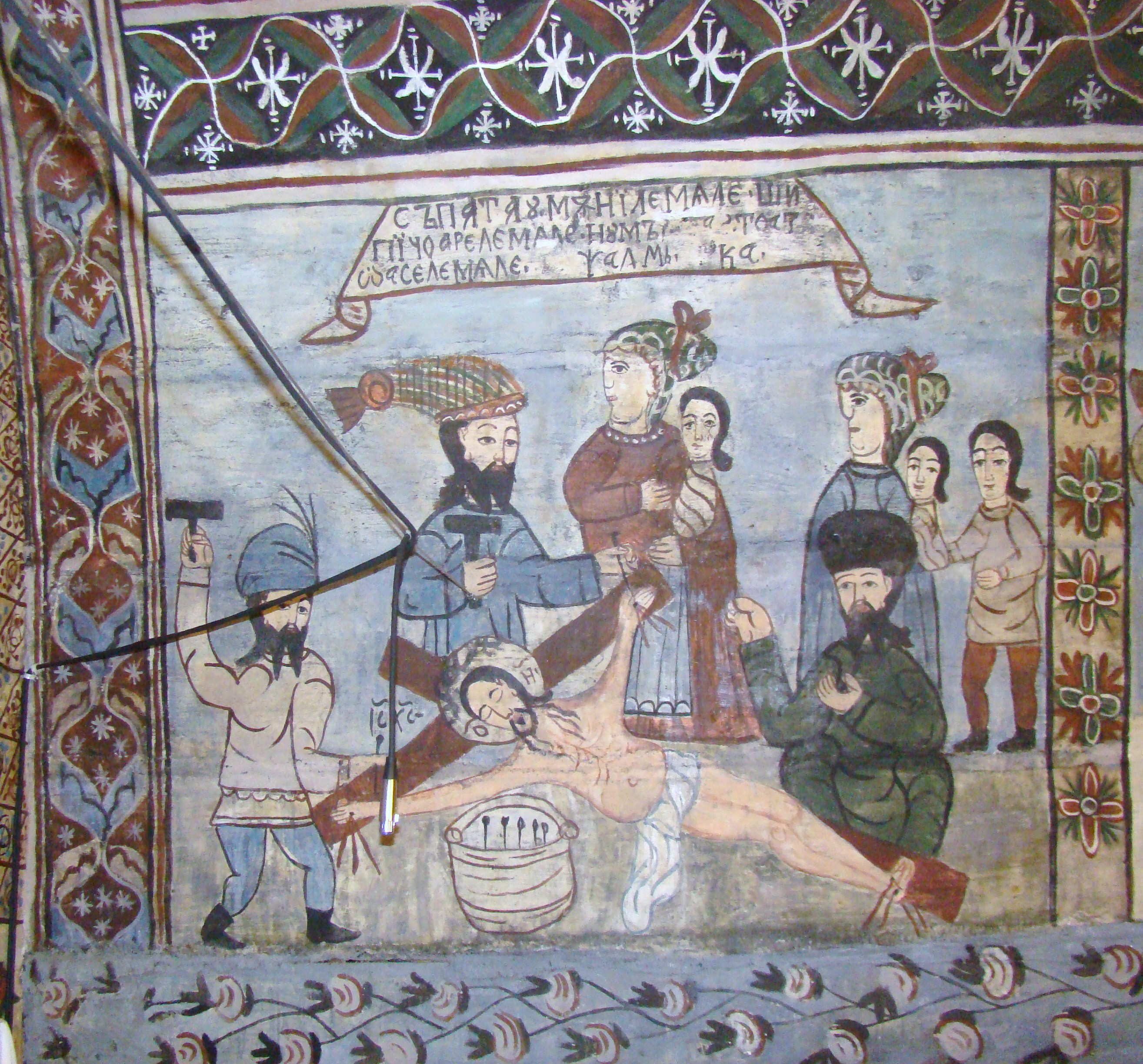 Biserica de lemn „Sf. Arhangheli Mihail şi Gavriil" din Tăuți, județul Cluj